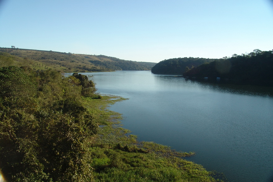 Ponte sobre o rio Paranapanema, entre os municípios de Bernardino de Campos e Timburi, estado de São Paulo, Brasil.